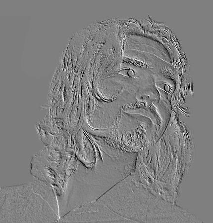 Полупрофил